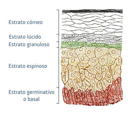 Capas de la epidermis. Ilustración.